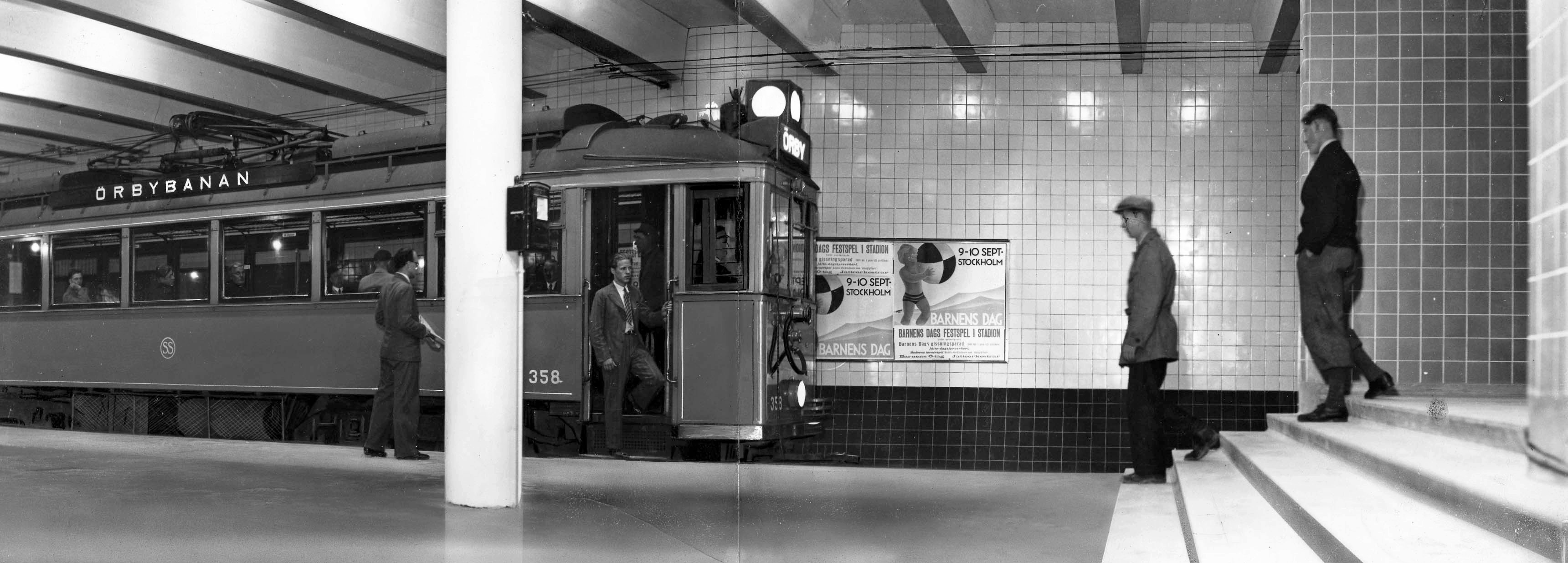 Nedgången på station Ringvägen (idag station Skanstull)